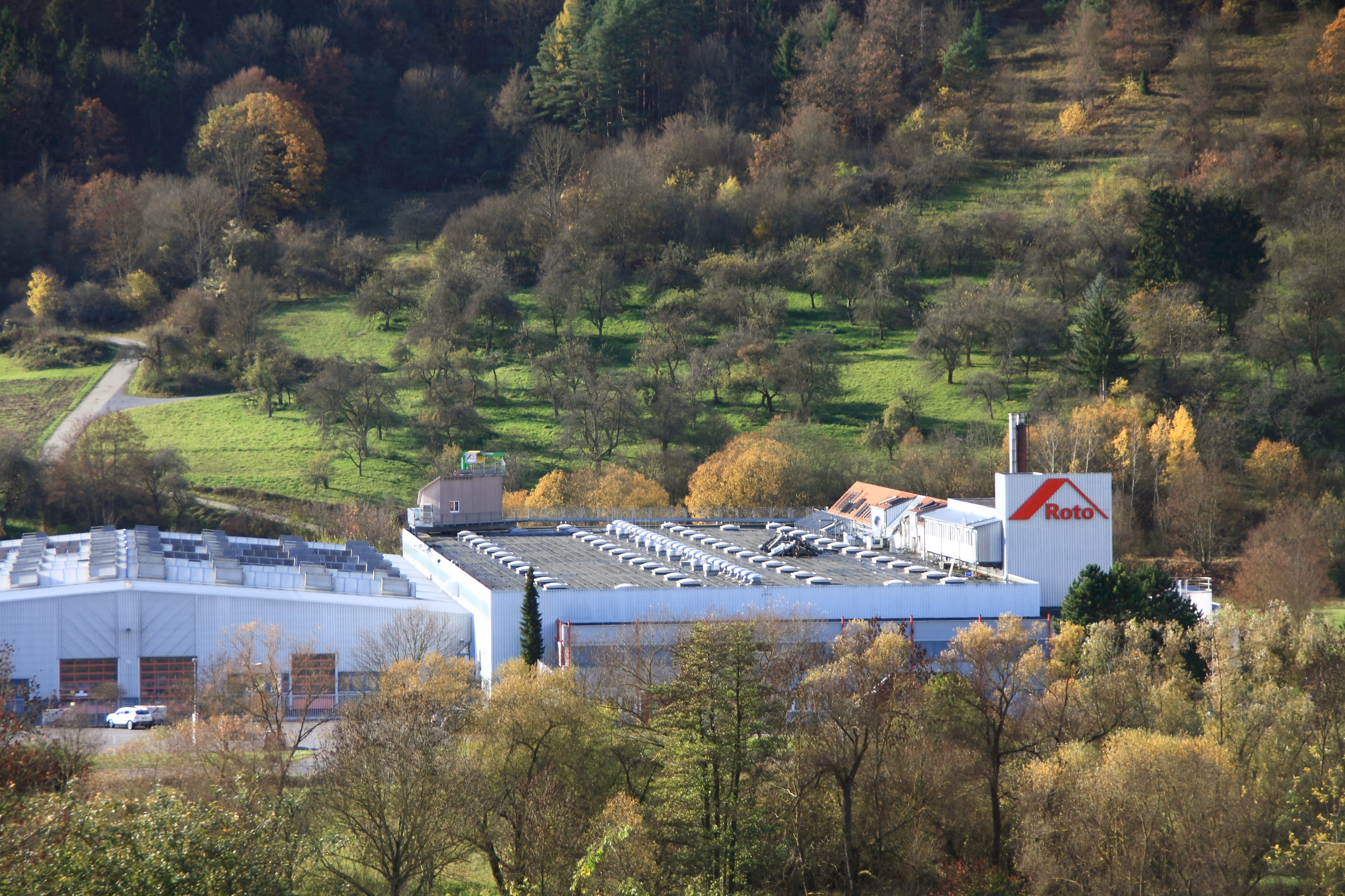 Das Werk in Bad Mergentheim-Edelfingen im Herbst 2013.